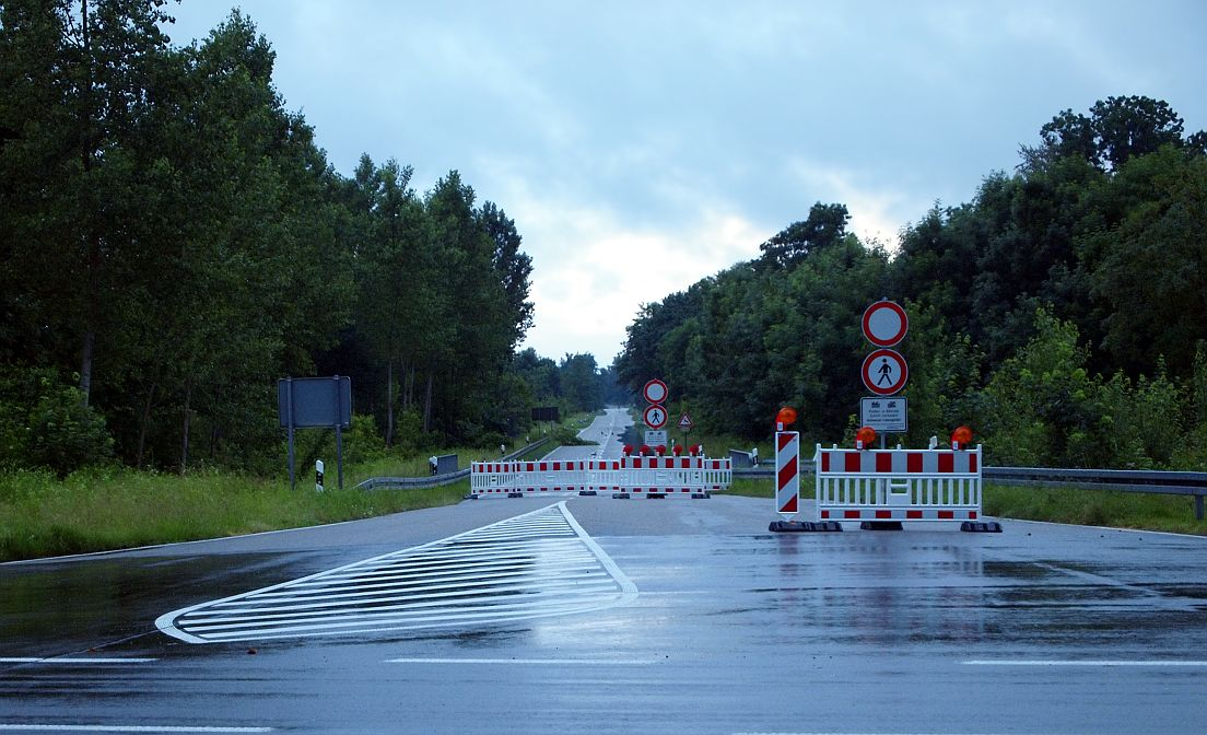 Polder Söllingen/Greffern ›in Betrieb‹, ökologische Flutung. Die Straße von Greffern zur Fähre liegt auf einem Damm und trennt Teilpolder 1 und 2, die Abzweigung nach Grauelsbaum führt hinab ins Überflutungsgebiet und ist gesperrt.